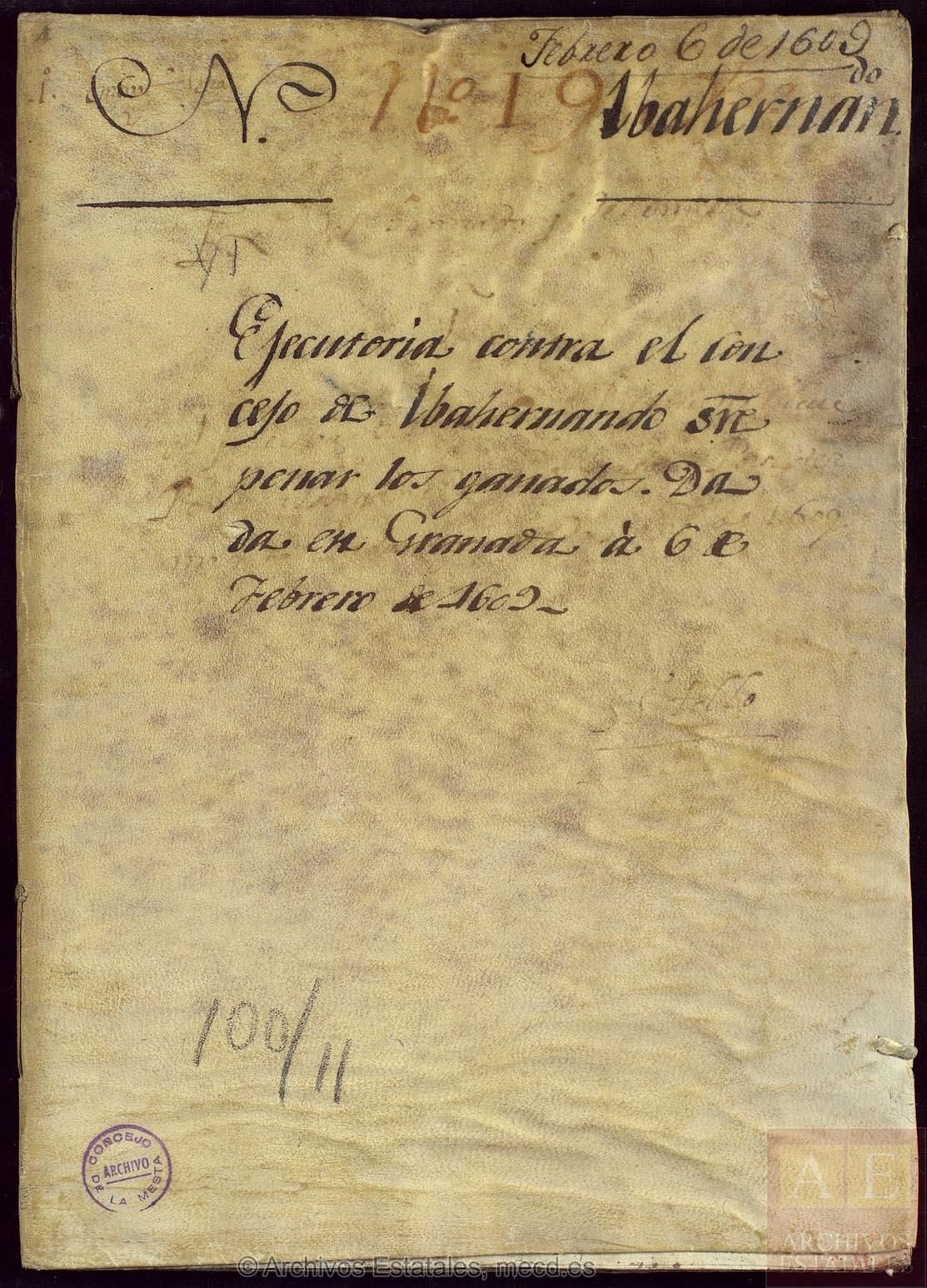 Ejecutoria